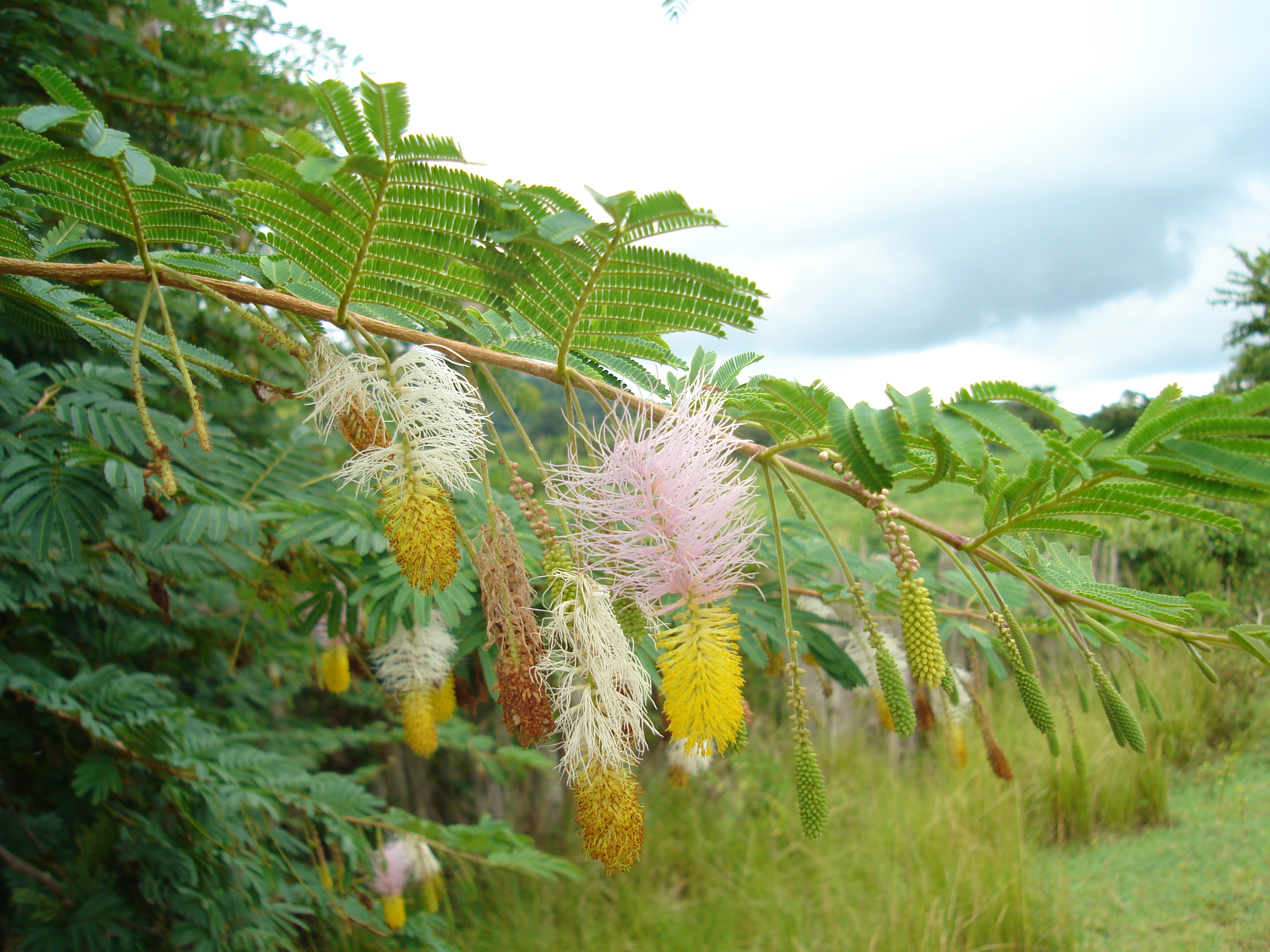 Dichrostachys cinerea, planta invasora e indeseable (weed, fotografiada en Pinar del Río, Cuba.